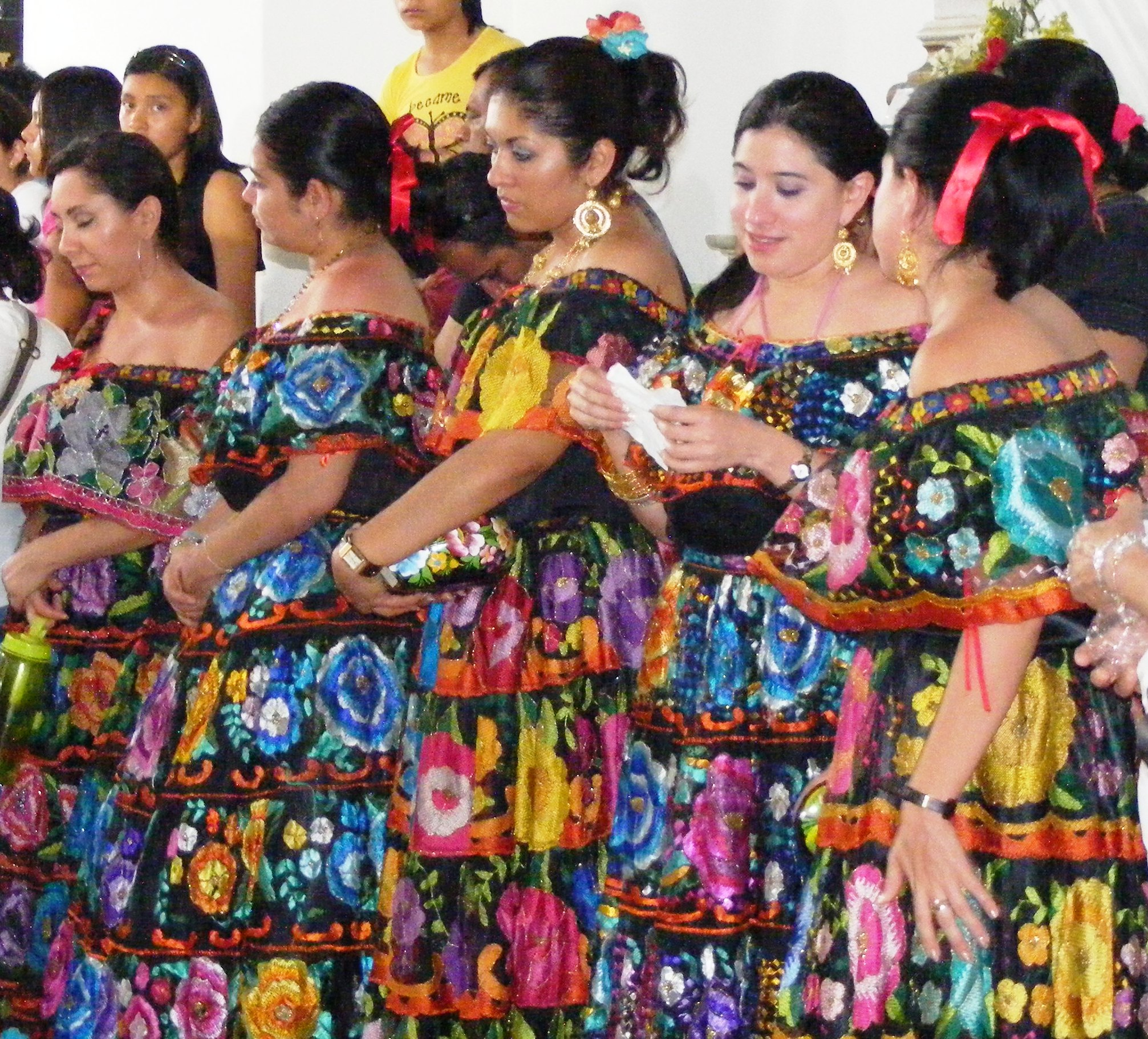 Traje de Chiapaneca